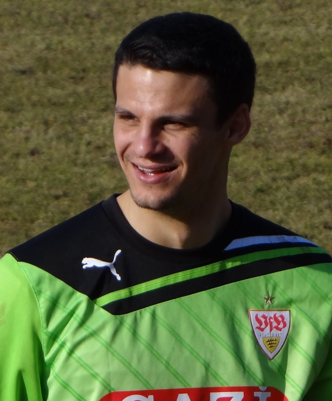 Andre Weis nach dem Spiel gegen Kickers Offenbach